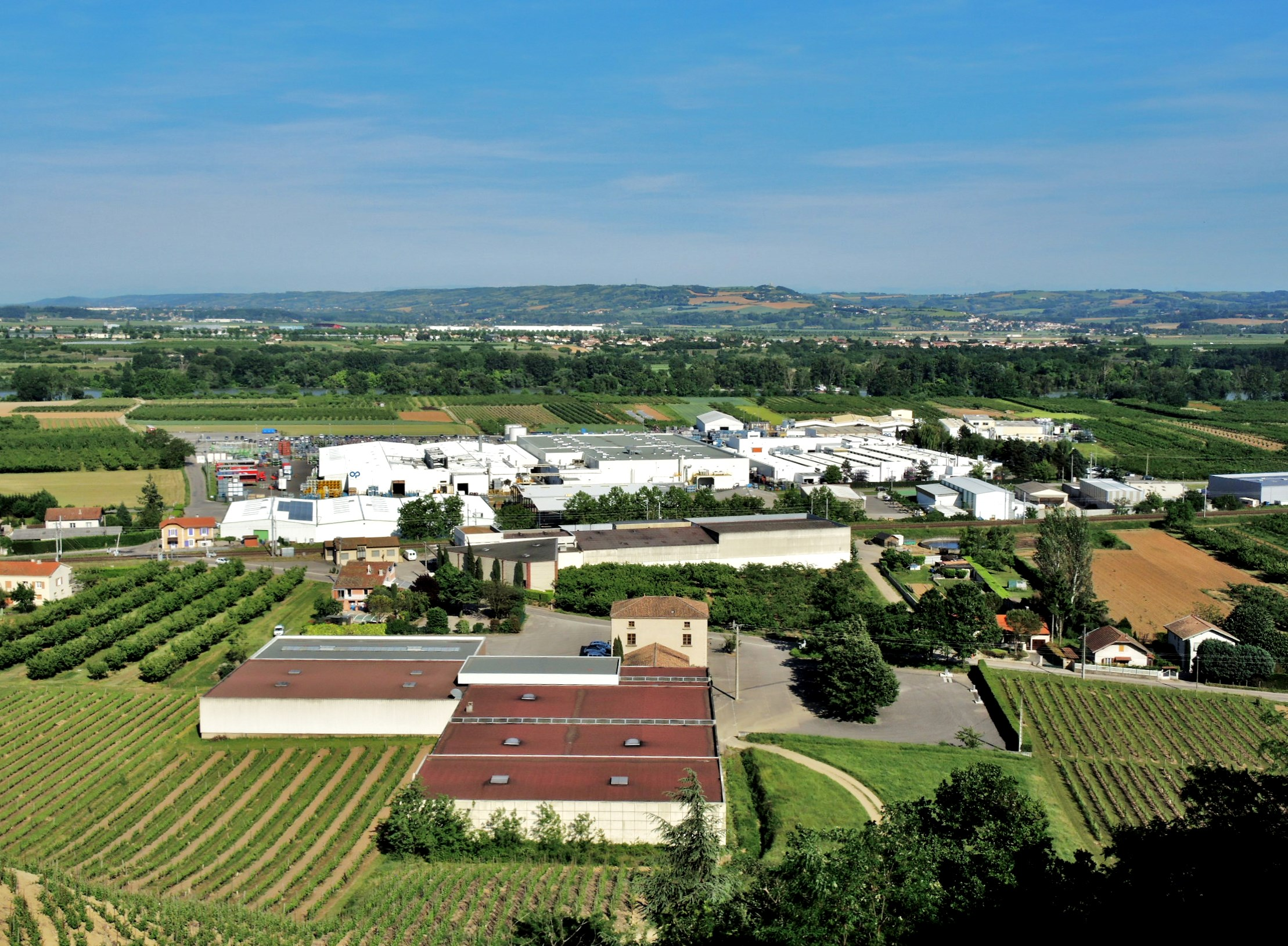 Saint-Désirat détail